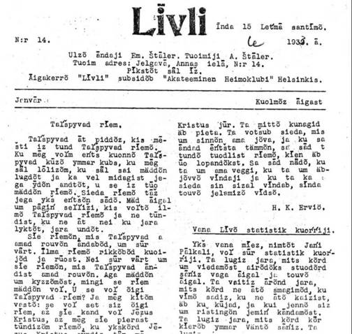 журнал Līvli